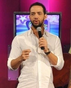 Locutor y presentador dominicano Sergio Carlo en 2010 por Reynaldo Brito de